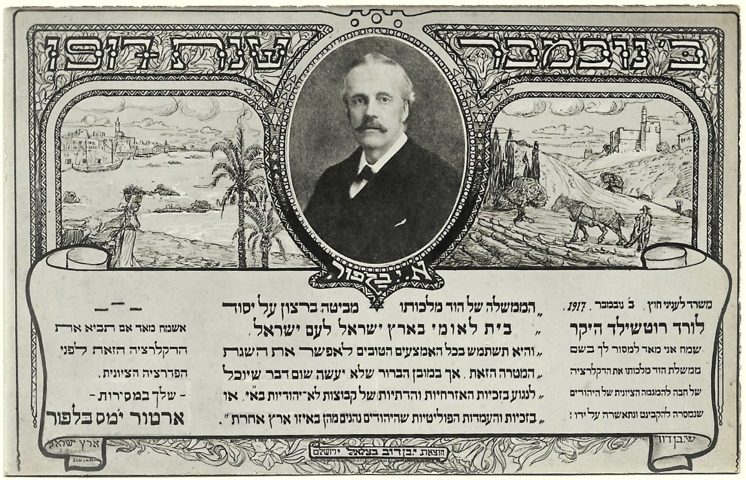 Print